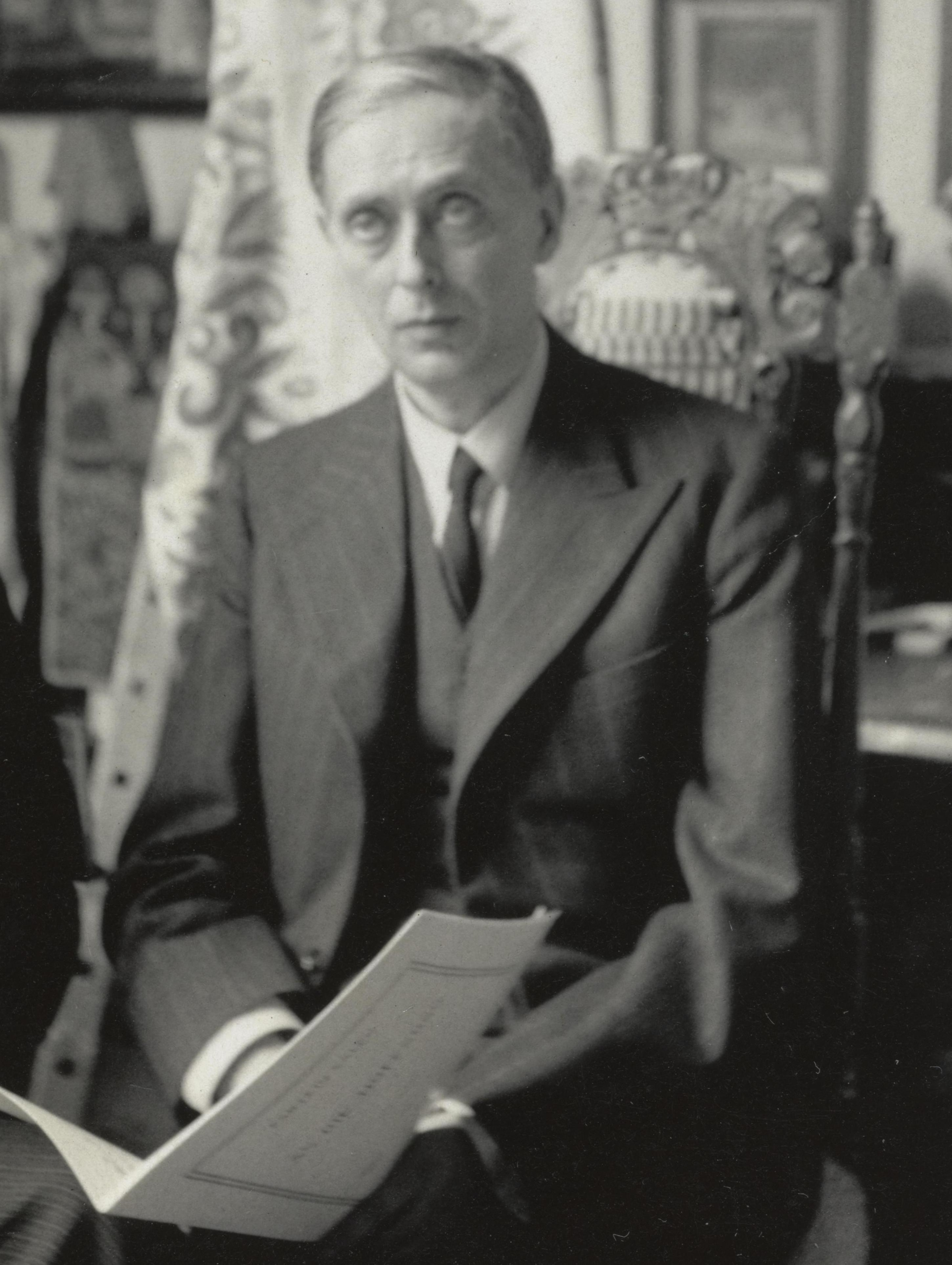 Bildet er hentet fra Nasjonalbibliotekets bildesamling Depicted person: Valen, Fartein